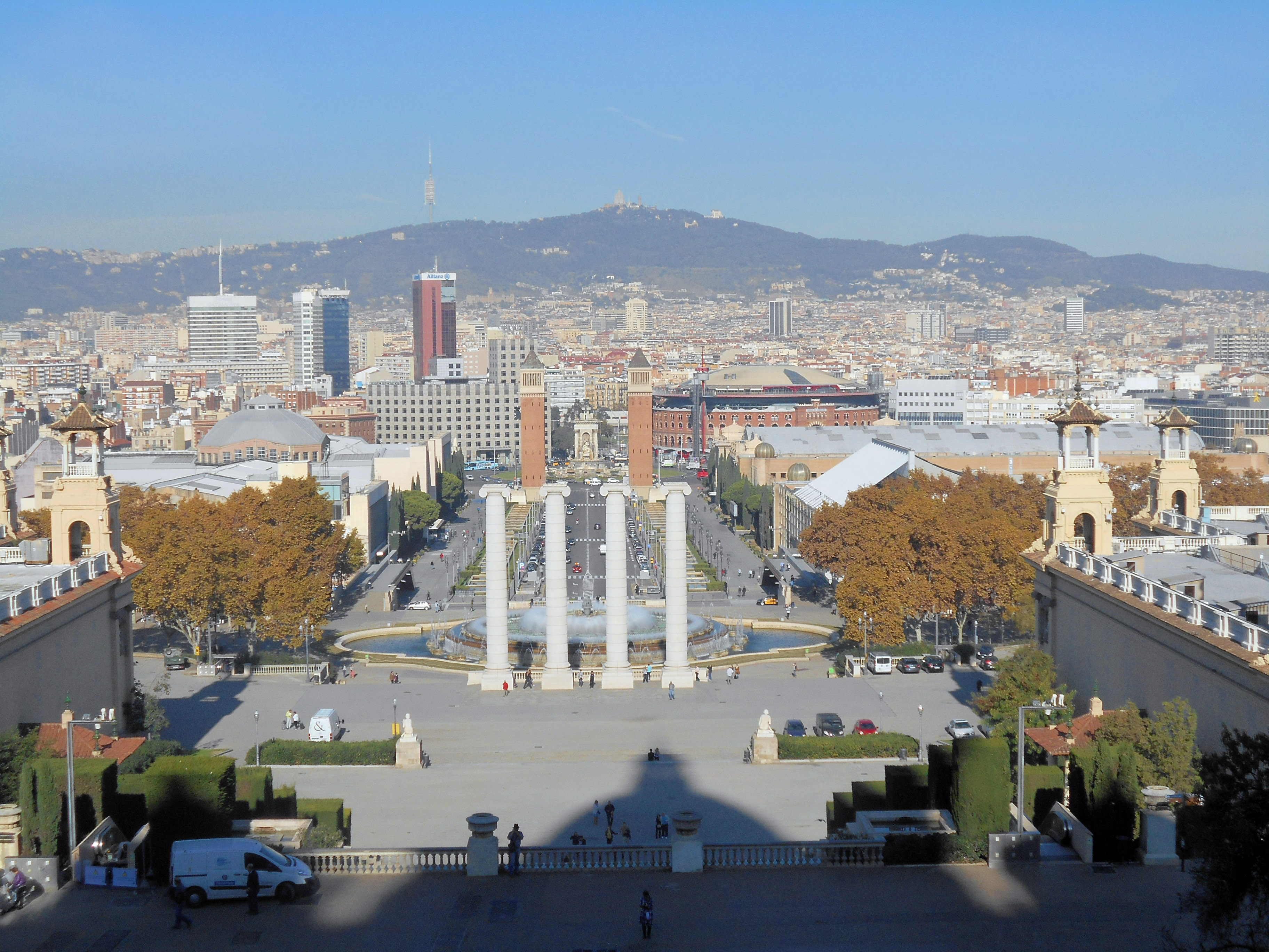 Barcelona vista desde Montjuïc.